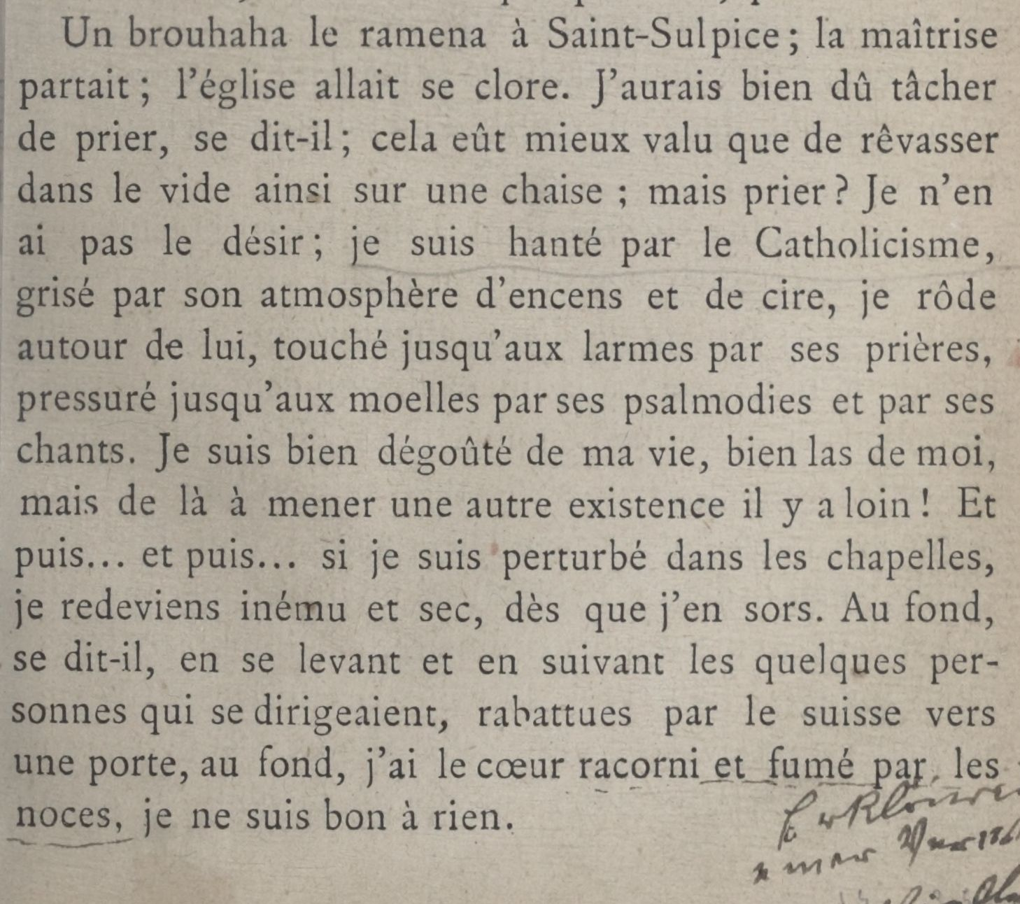 "En route", Joris-Karl Huysmans, 1895, extrait, page 25.